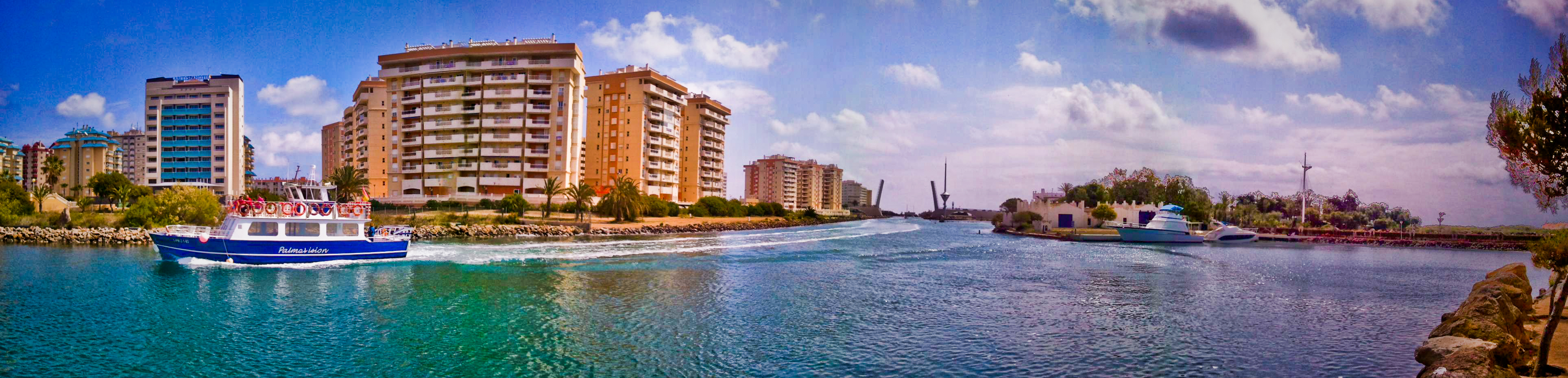 Vista panorámica del canal del Estacio, con el puente levadizo al fondo en La Manga del Mar Menor (Murcia - Spain)